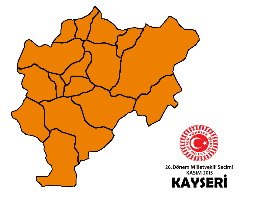 Kasım 2015 seçimleri